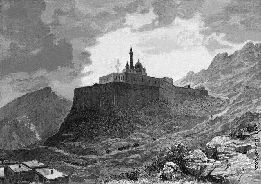 Крепость Баязет